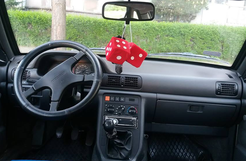 Deska rozdzielcza Daewoo-FSO Poloneza Caro Plus 1.6 GSI z 1999 roku.